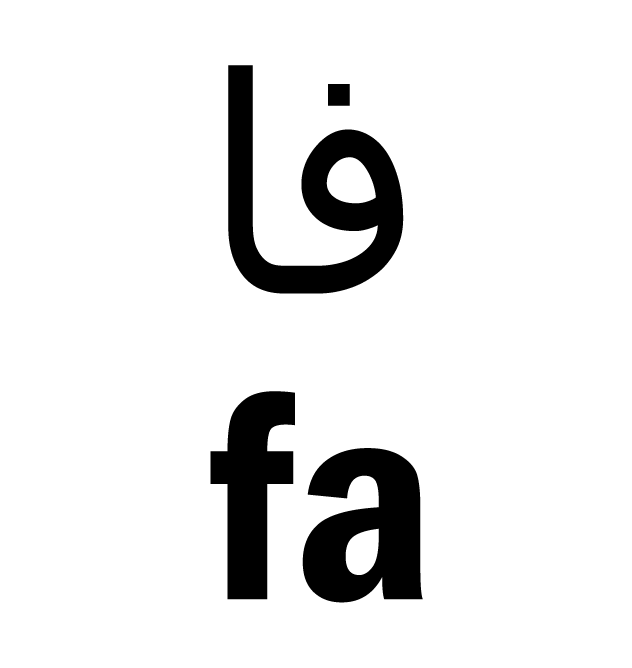 نماد زبان فارسی به‌انگلیسی و فارسی (پارسی) تقدیم به جهان